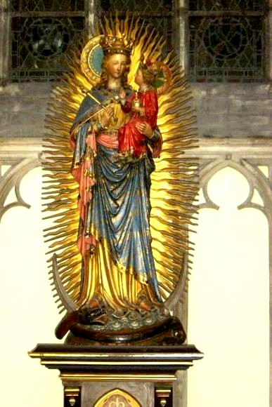 eigen foto bewerking